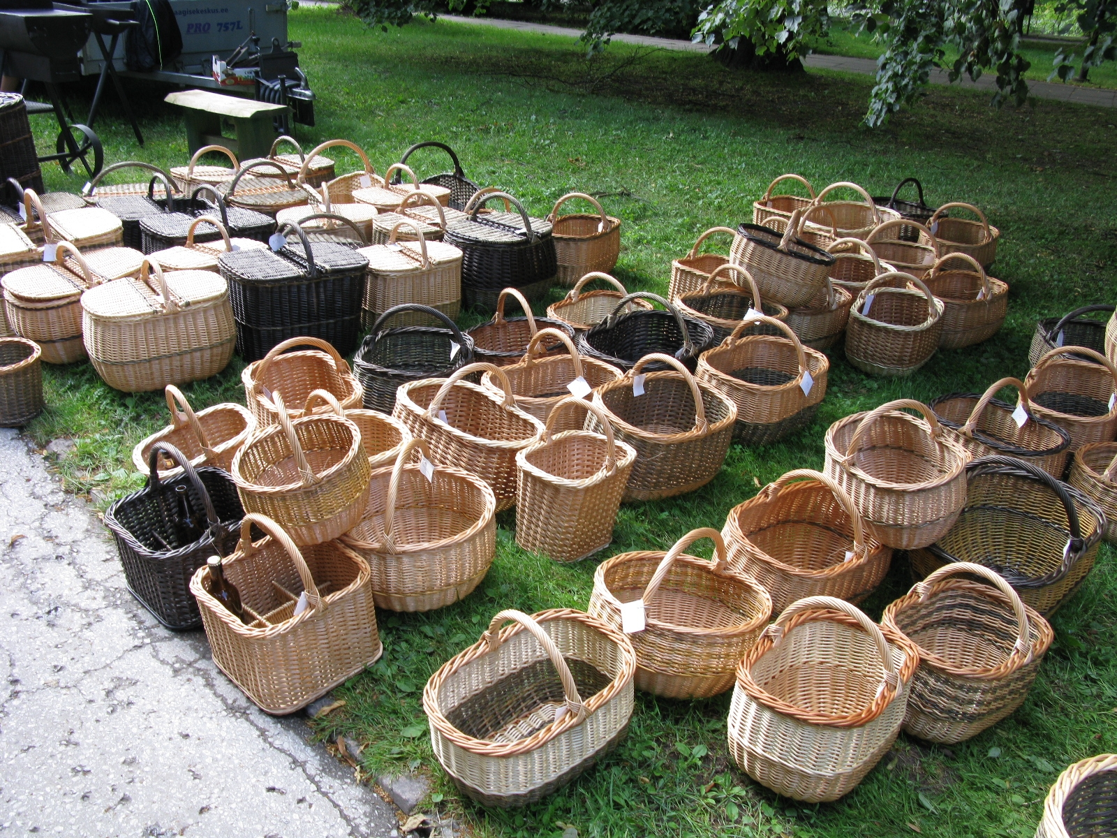 Korviväljapanek Tartu hansapäevade Jõelinnas, 20. juuli 2012. Foto: Oop.